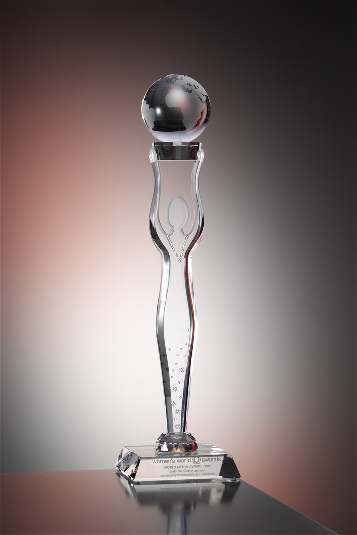 Joska Kristall, Women’s-World-Awards-Pokal